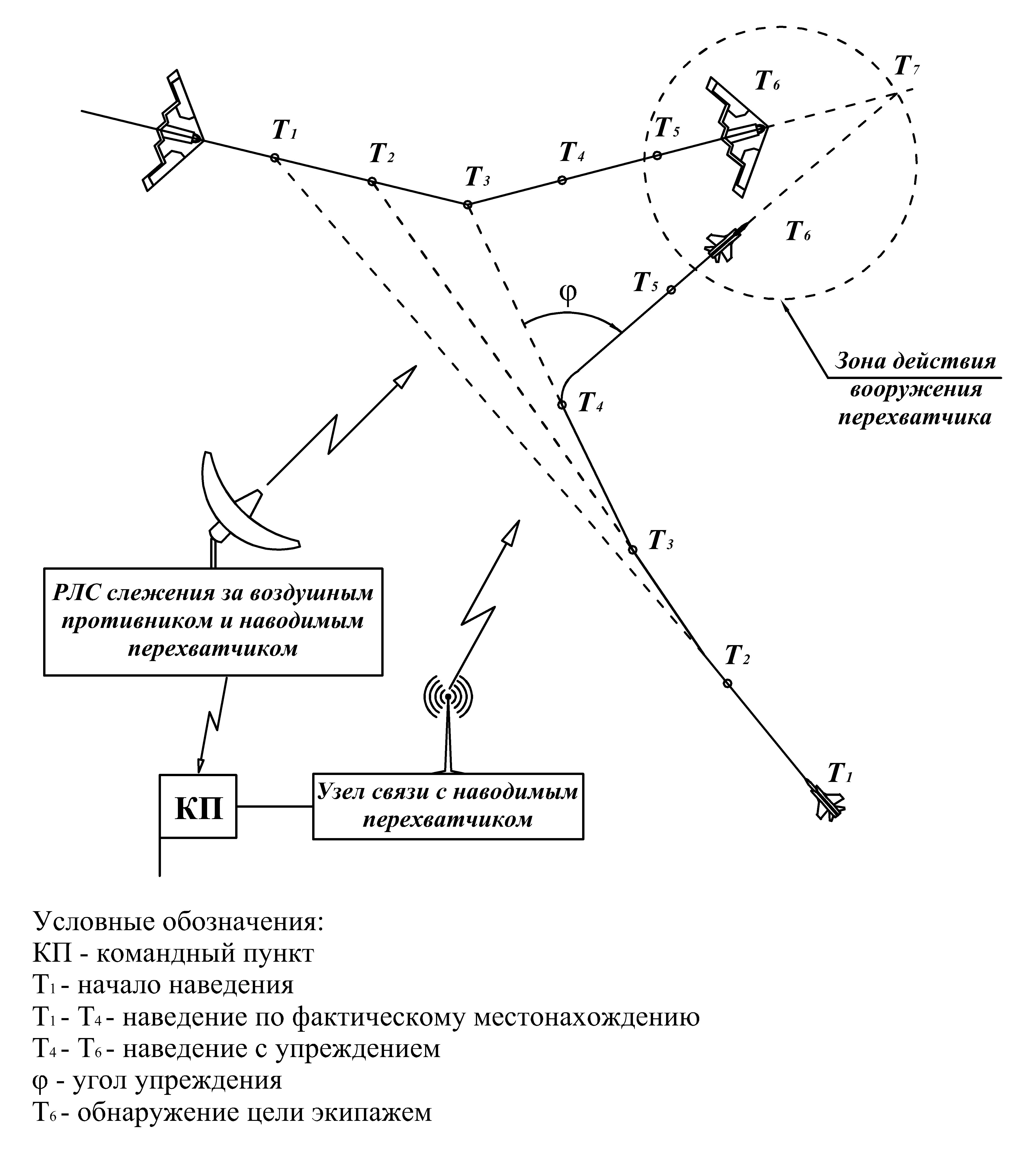 Принципиальная схема наведения истребителя-перехватчика. Для основы взята иллюстрация в ВЭС ( Военный энциклопедический словарь (ВЭС),М.,ВИ,1984 г., страница 468)